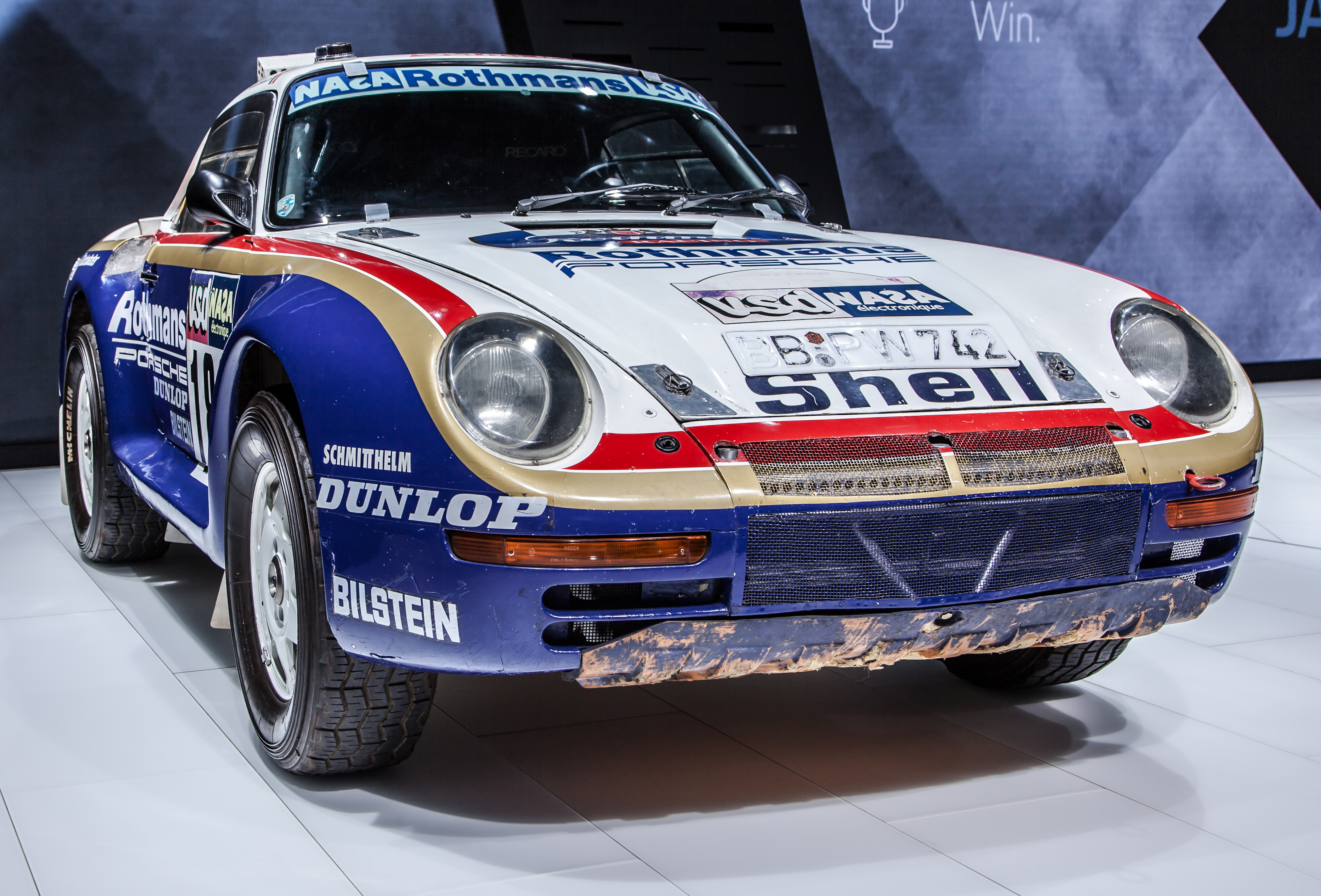 Porsche 959 Rothmans auf der IAA 2017